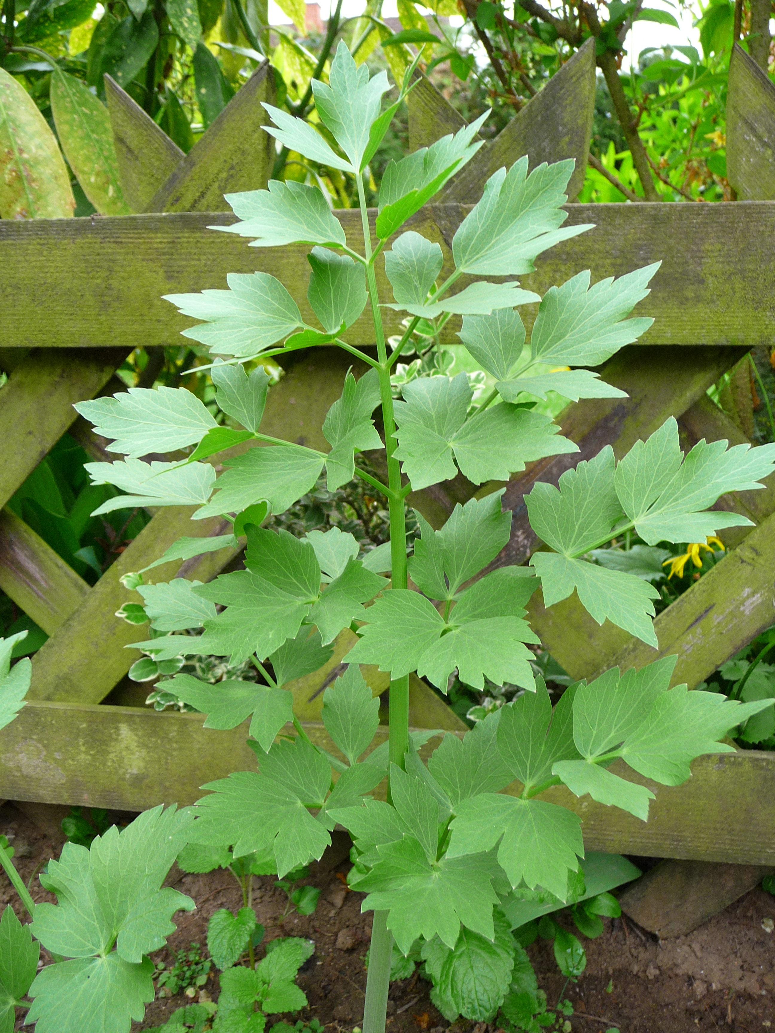 Liebstöckl, auch genannt Maggikraut (Levisticum officinale), fotografiert in Heidelberg (Baden-Württemberg, Deutschland)